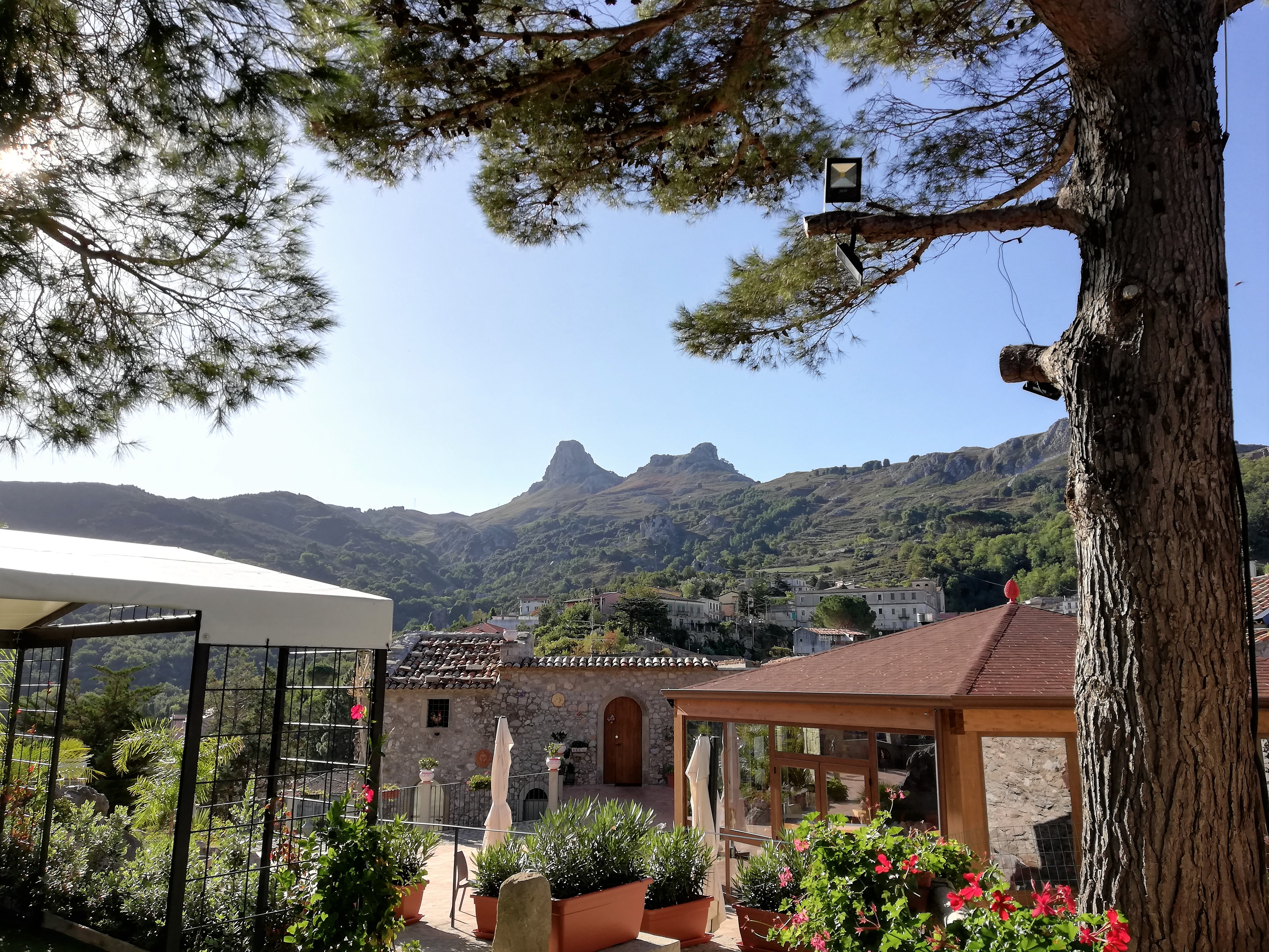 Corte e veduta della Rocca Salvatesta.